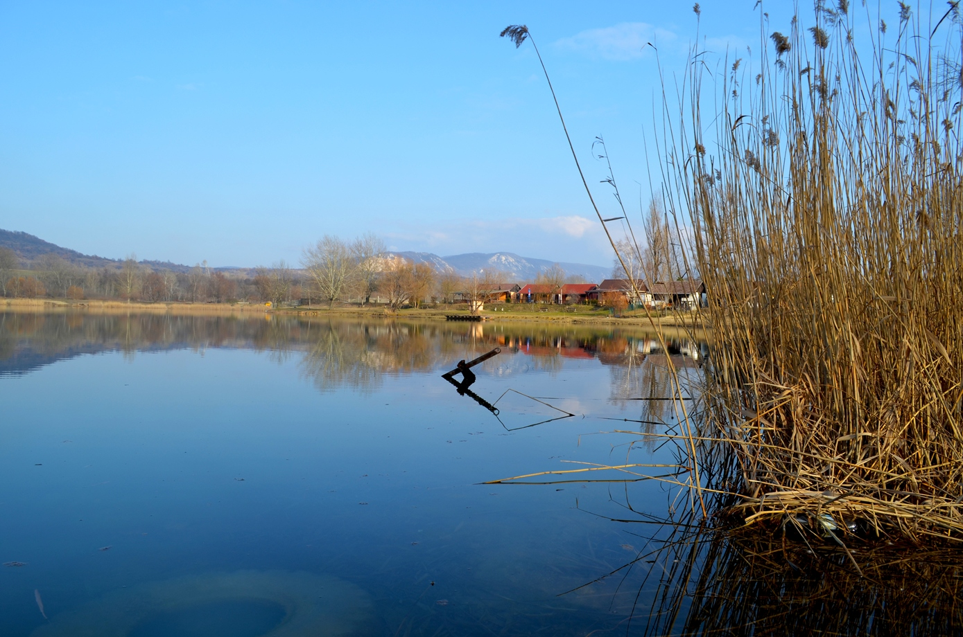 Nádas a tó délnyugati részén.